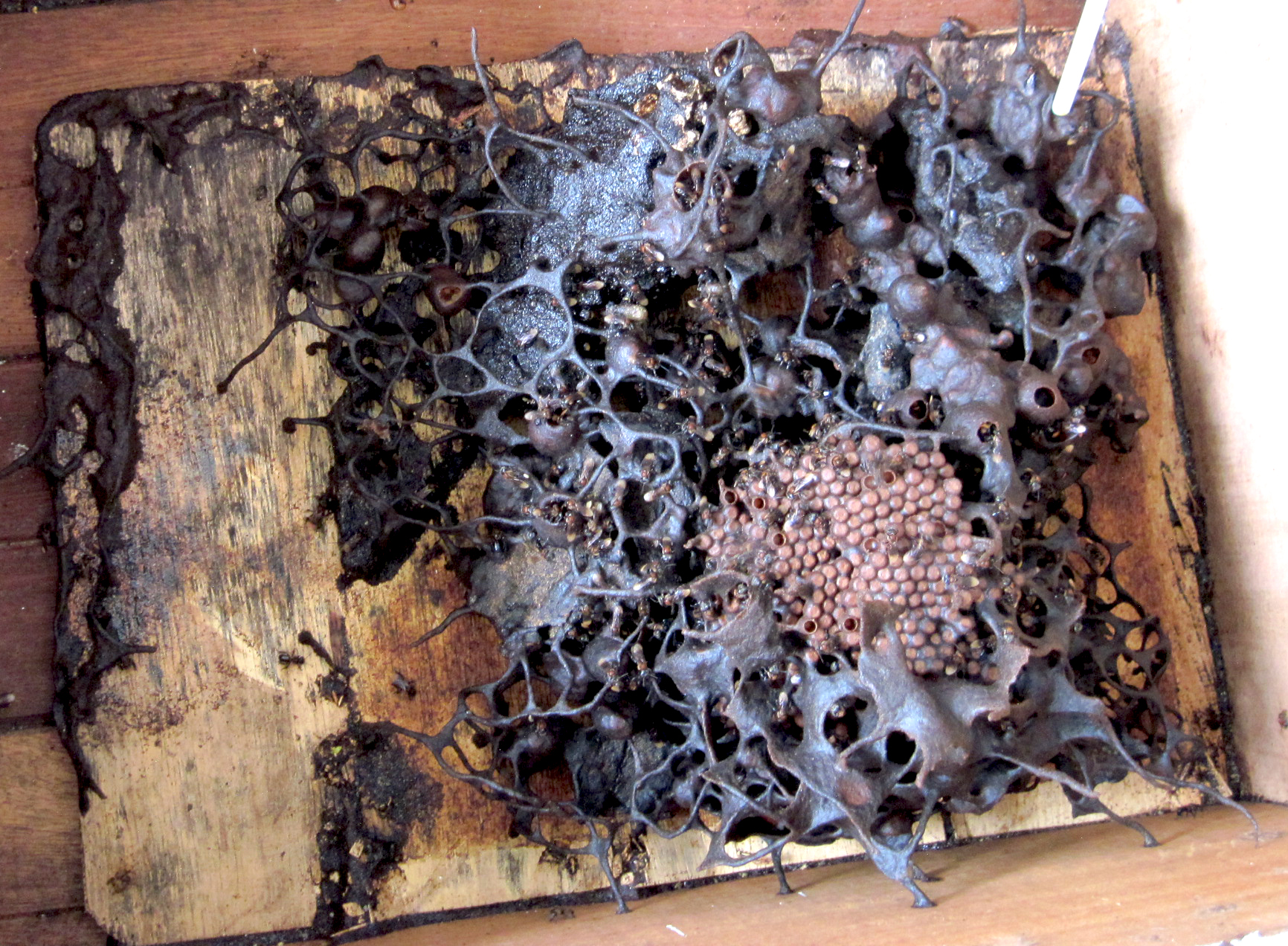 Sarang lebah kelulut yang dibela di MARDI Serdang.